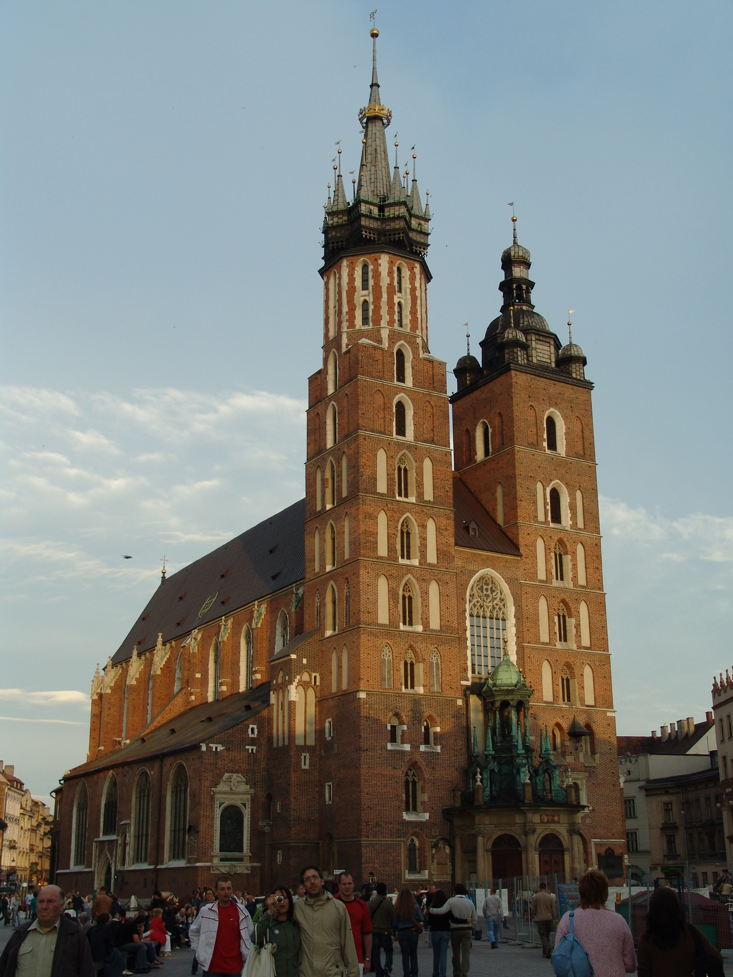 St Mary's church (kosciol Mariacki) in Krakow